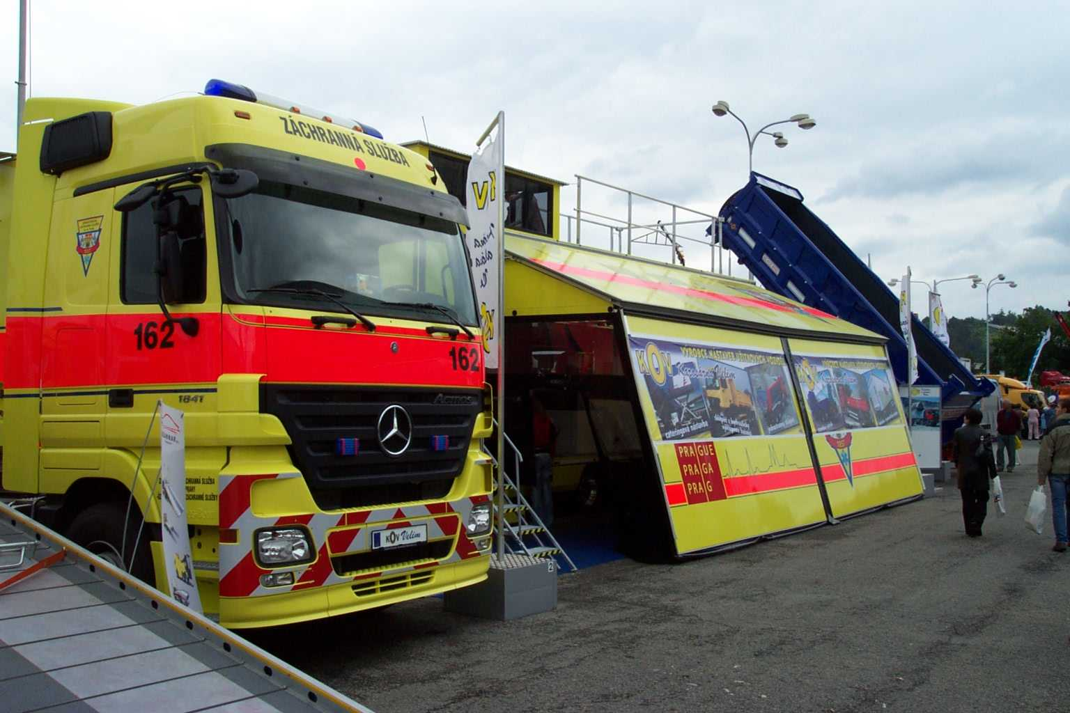 Medical special truck at Autotec trade fair in Brno - Speciální zdravotnický nákladní automobil na veletrhu Autotec v Brně